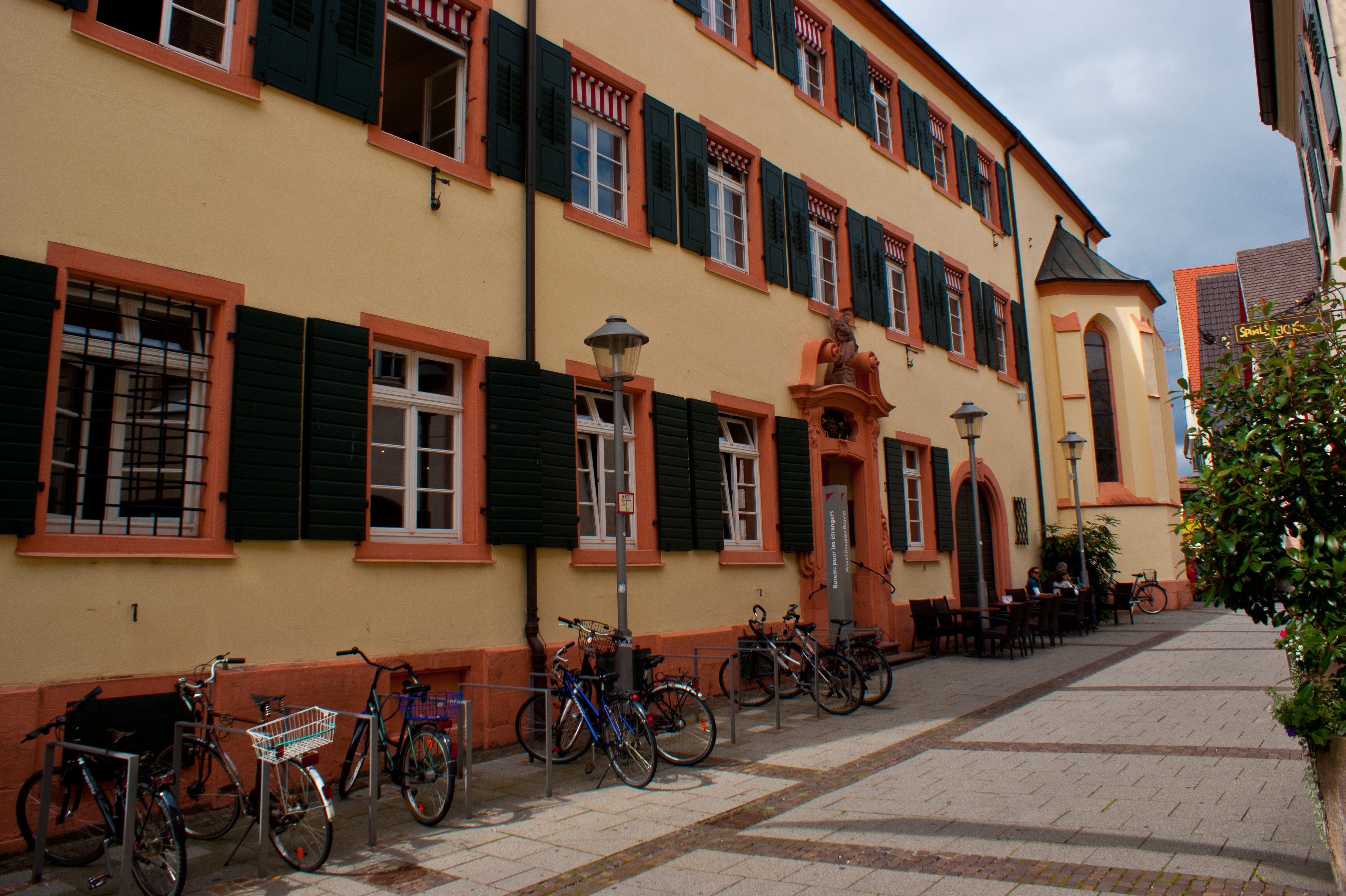 St. Andreas Hospital